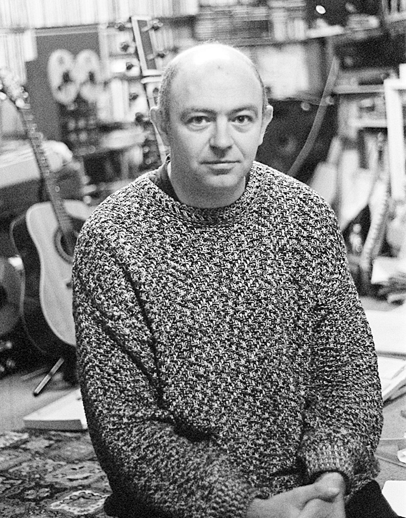 Alan Holmes